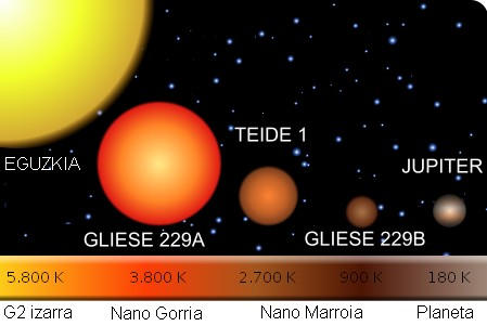 Izarren tamainak eta tenperatura fotosferikoak